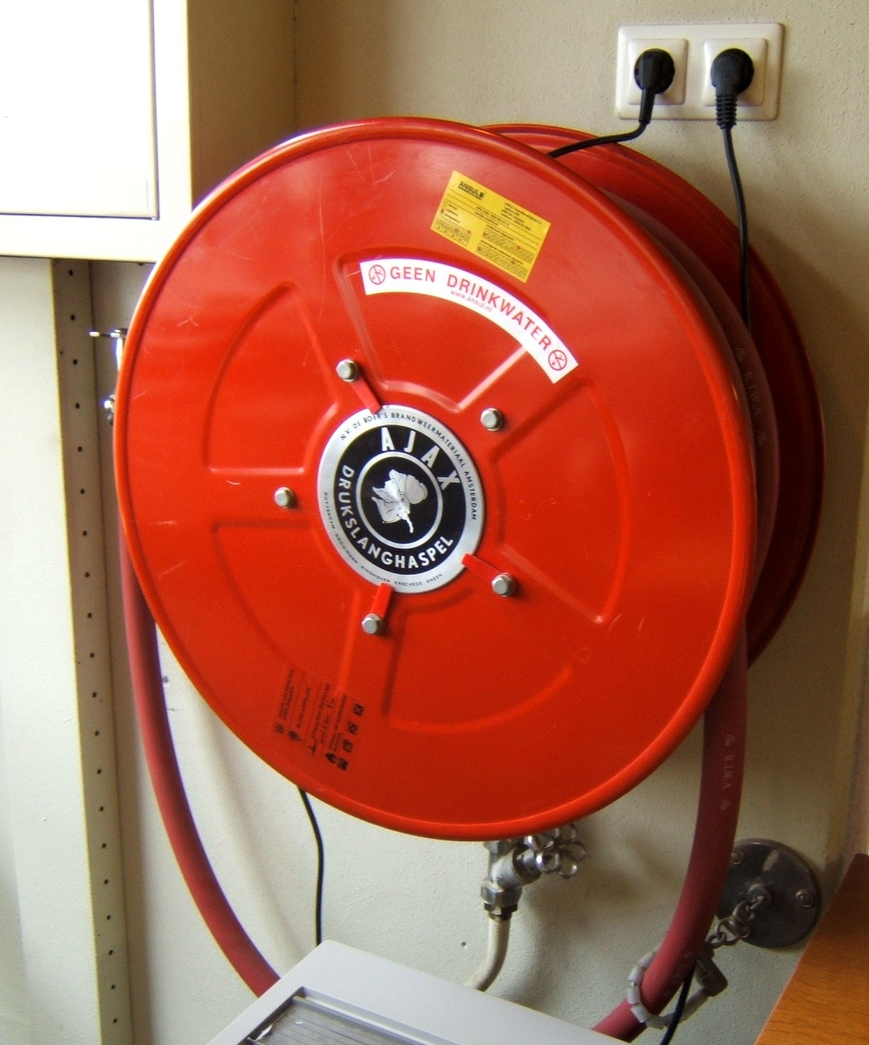 Brandslang op haspel Licensing Categorie:Afbeelding voorwerp